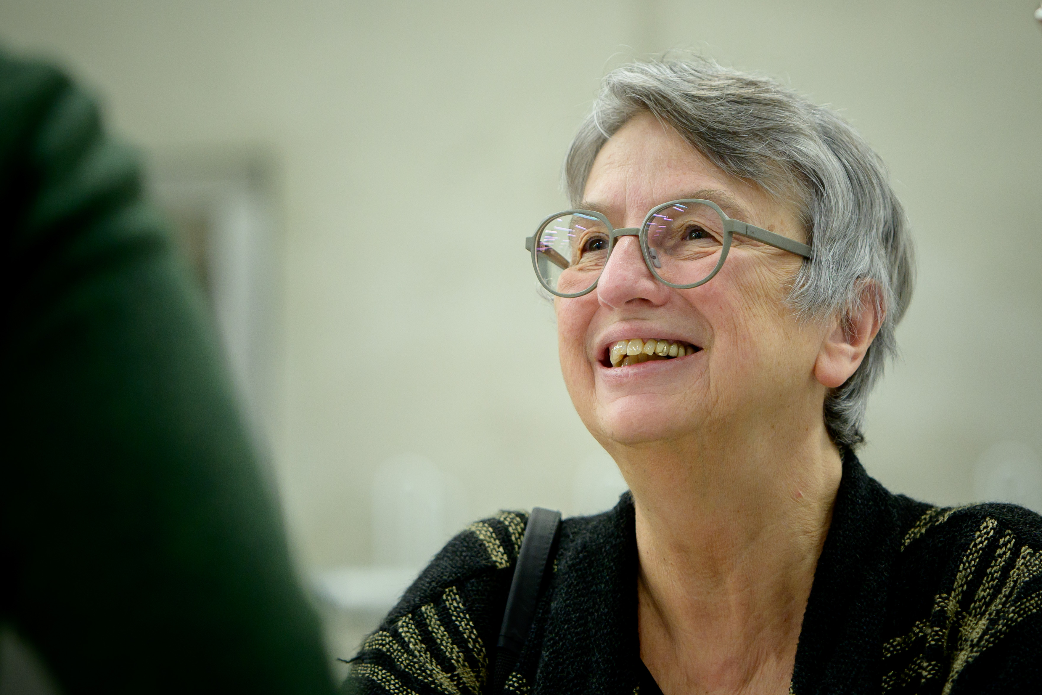 Gabriele Dietze (Medien- und Kulturwissenschaftlerin, Autorin von “Sexueller Exzeptionalismus") Foto: Stephan Röhl